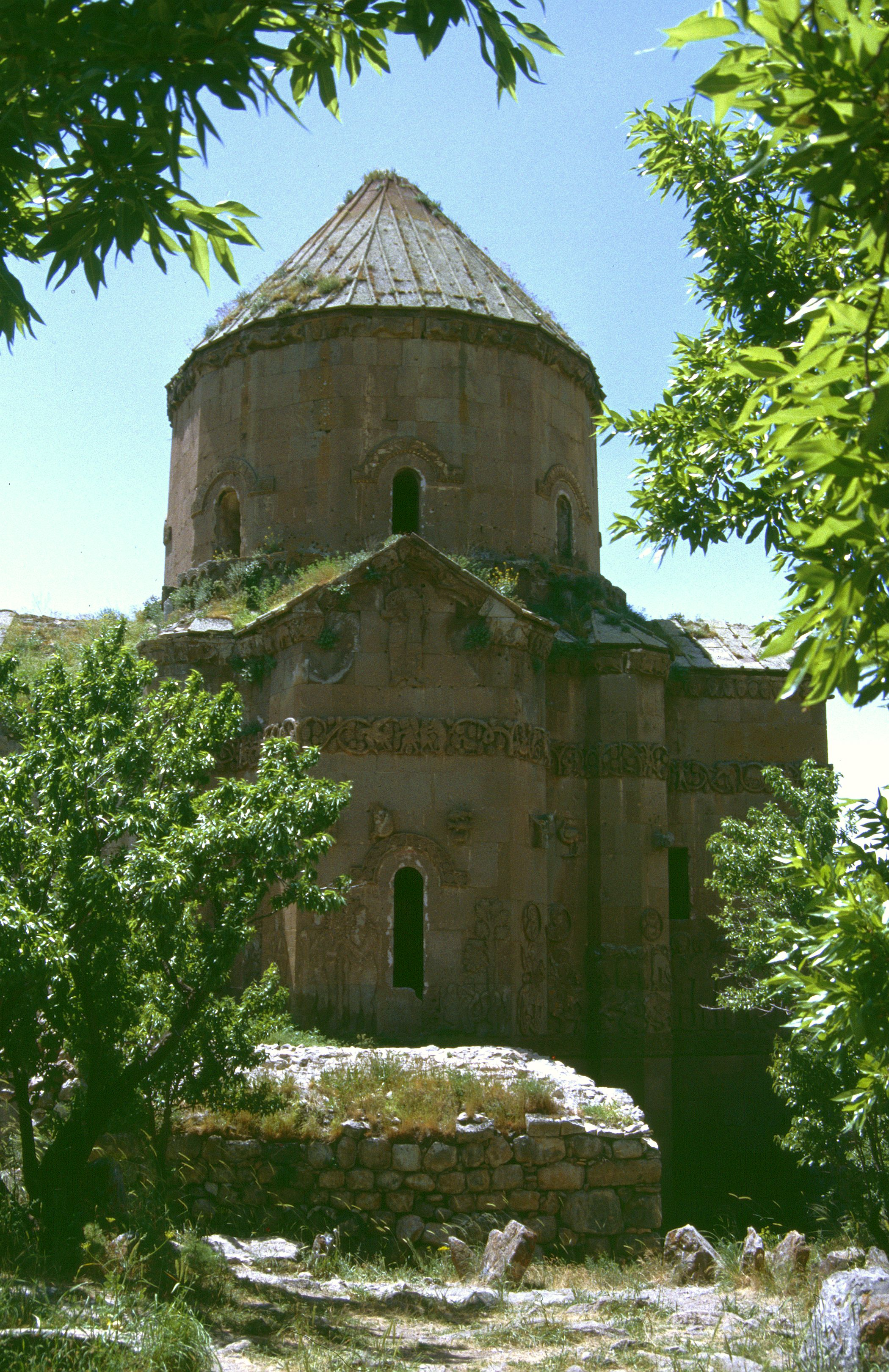 Ahtamar: Heiligkreuzkirche